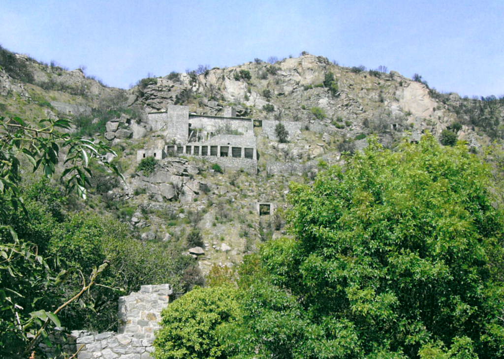 Vue générale de l'ancienne carrière de Granite de Rodès (France) dans les Pyrénées Orientales